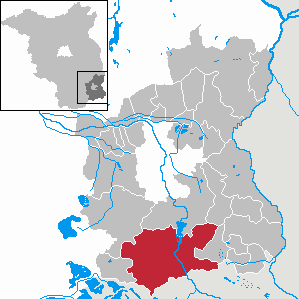 Spremberg in Brandenburg (Country) - District Spree-Neiße